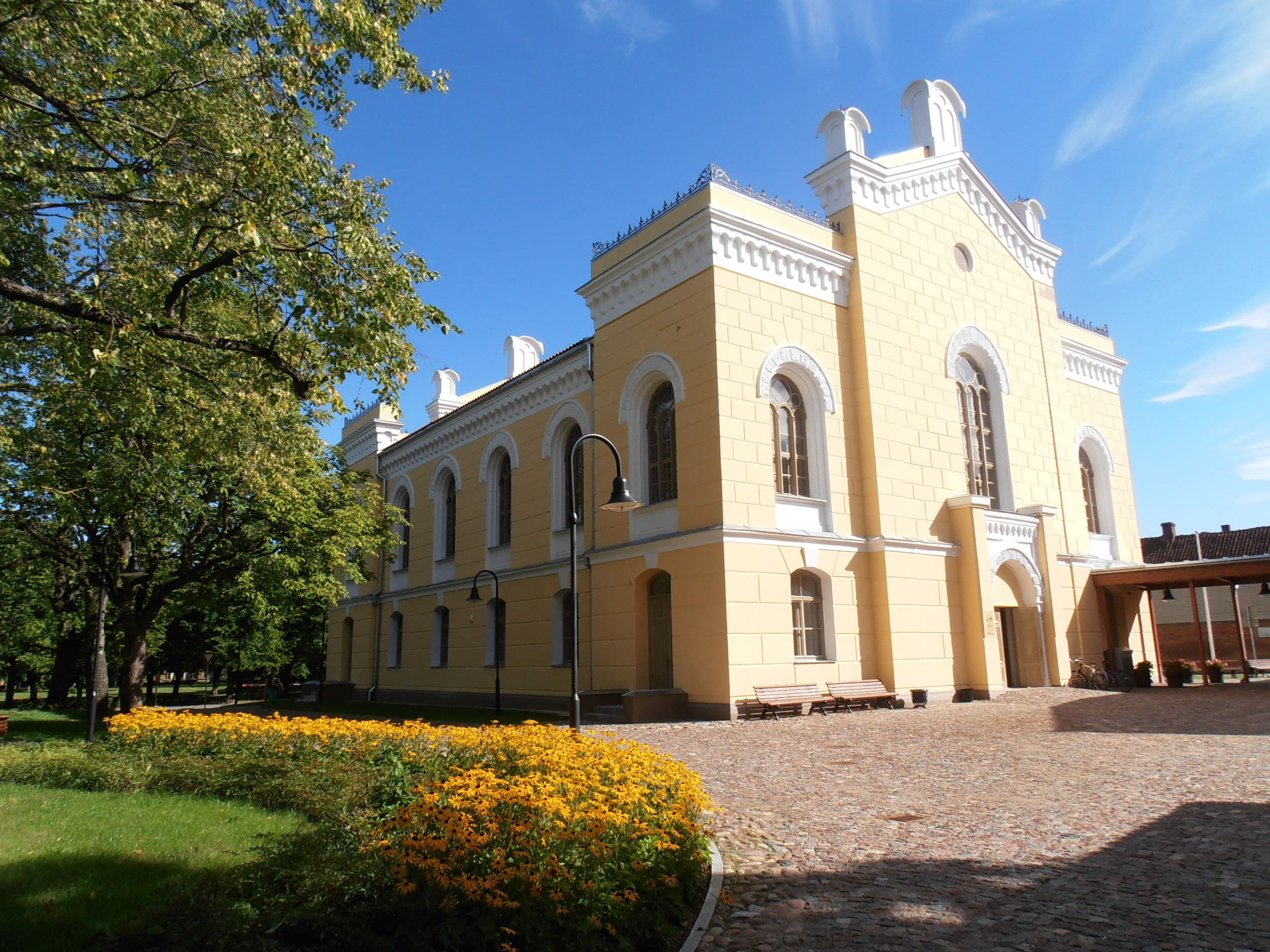 ehemalige Synagoge Kuldiga - heute Bibliothek, Blick von Norden